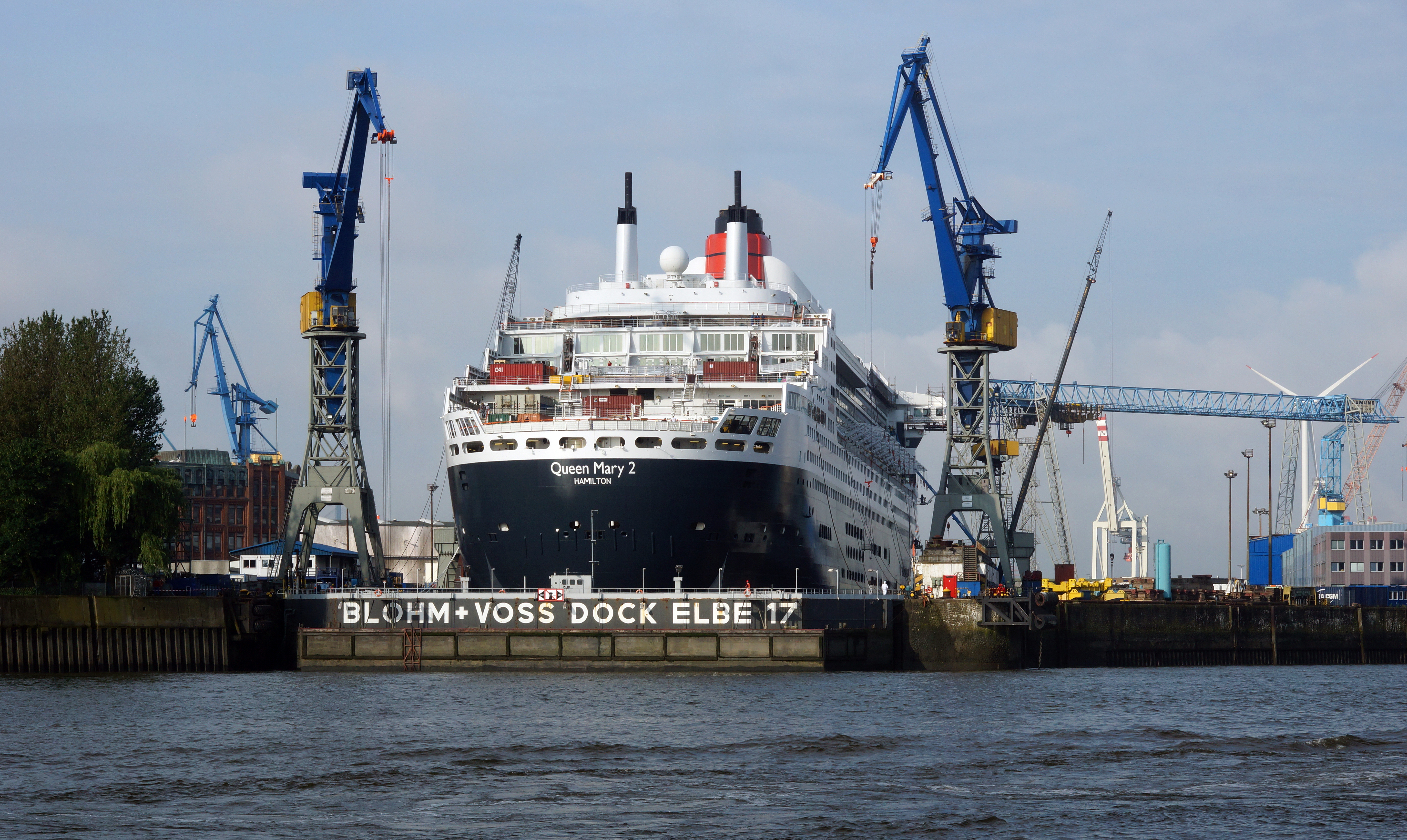 Queen Mary am 15. Juni 2016 im Trockendock Elbe 17, Blohm + Voss in Hamburg. Dort wurden vom 26. Mai bis 17. Juni umfangreiche Modernisierungsmaßnahmen durchgeführt.